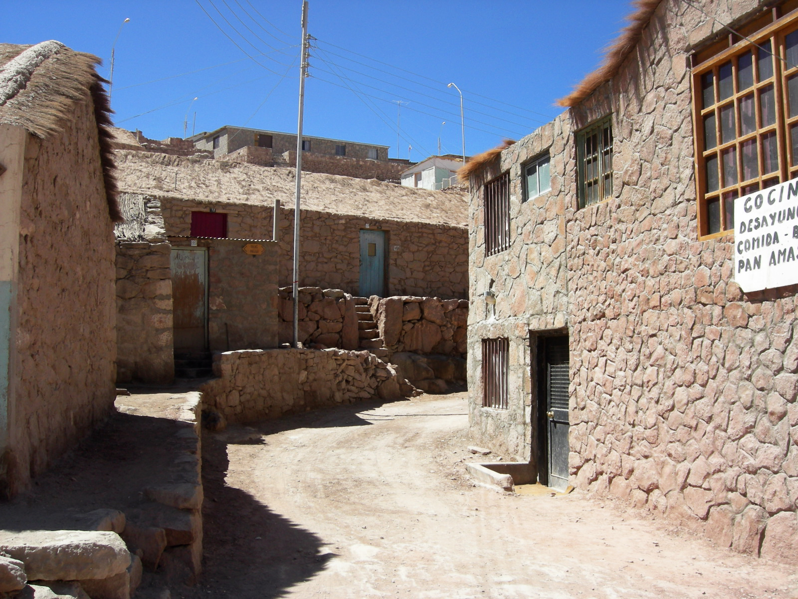 Pueblo de Ayquina y campos de cultivo This is a photo of a national monument in Chile: 550